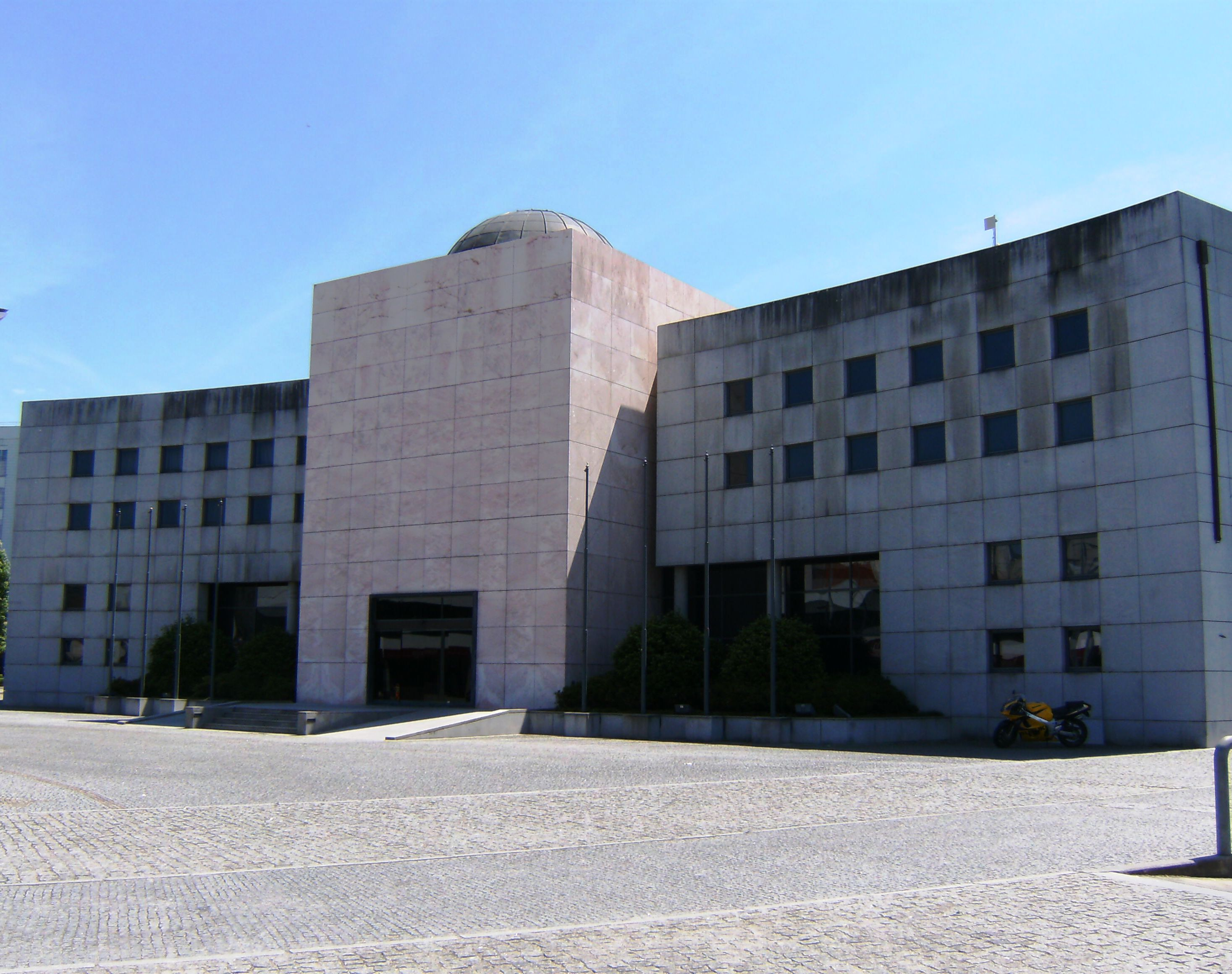 Edifício dos Paços do Concelho de Paços de Ferreira